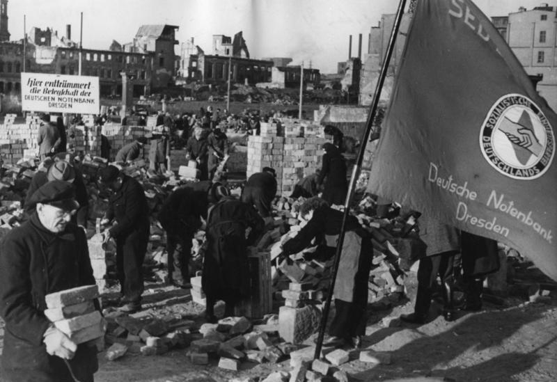 Dresden, NAW-Einsatz am Altmarkt Zentralbild/Höhne-Pohl 15.12.1952 Bauplatz Dresden Beginn der Arbeiten für die Bauten des Sozialismus in Dresden. Am 14.12.1952 wurde im Zentrum Dresdens an der Westseite vom Altmarkt der erste Spatenstich zu den Bauten des Sozialismus in Dresden getan. Tausende von freiwilligen Aufbauhelfern waren erschienen, um mitzubauen an einer neuen Epoche an der Geschichte der Stadt. Der Beschluß des Ministerrates vom 28.8.1952, der auf Initiative der Sozialistischen Einheitspartei Deutschlands gefaßt wurde und den Aufbau des Zentrums von Dresden für 1953 vorsieht, wird damit verwirklicht. Nun wird Dresden - nachdem schon in der Pirnaischen Vorstadt neue Wohnblocks von unseren Aufbauwillen Zeugnis ablegen - keine tote Stadt mehr sein und bald werden vom Altmarkt die Zeugen unseres sozialistischen Aufbaues emporwachsen. U.B.z.: Die Betriebsgruppen der SED geben bei den Aufbauarbeiten ein gutes Beispiel.